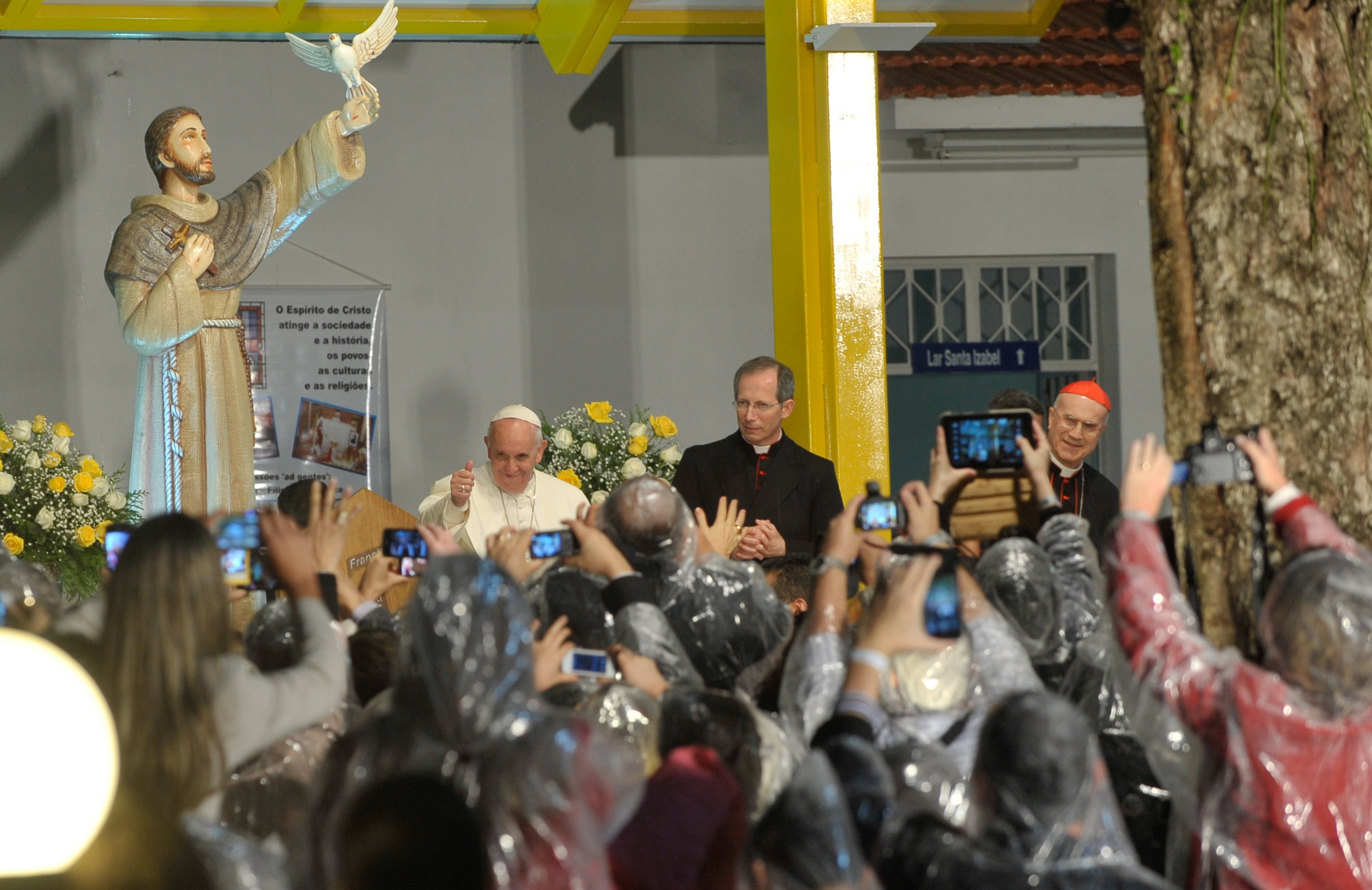 Papa Francisco participa de inauguração do Polo de Atendimento a Dependentes Químicos, do Hospital São Francisco.